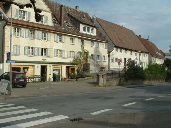 Former Jewish quarter, Laupheim